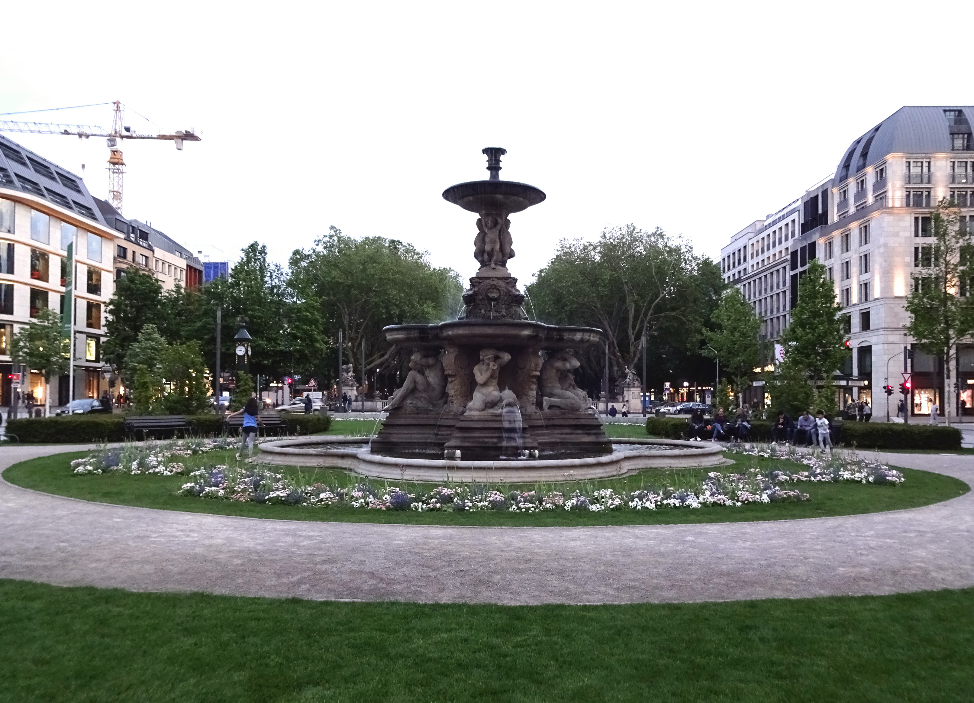 Corneliusplatz Sicht auf Schalenbrunnen von Leo Müsch in Richtung Kö, Düsseldorf